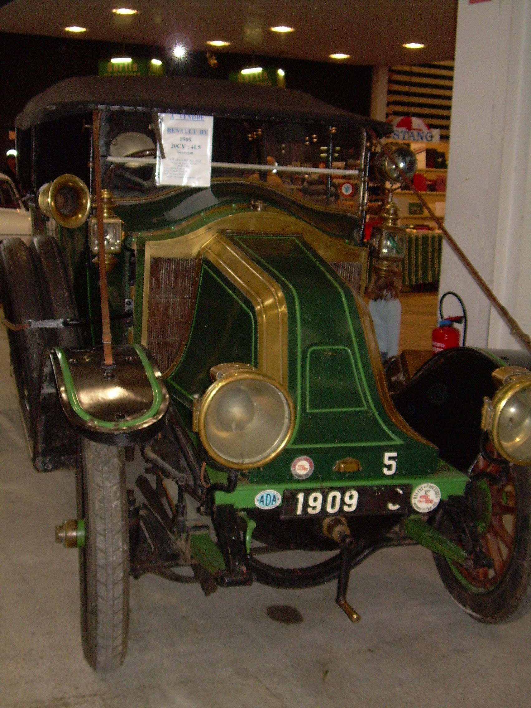 Epoqu'auto 2007 - Renault BY